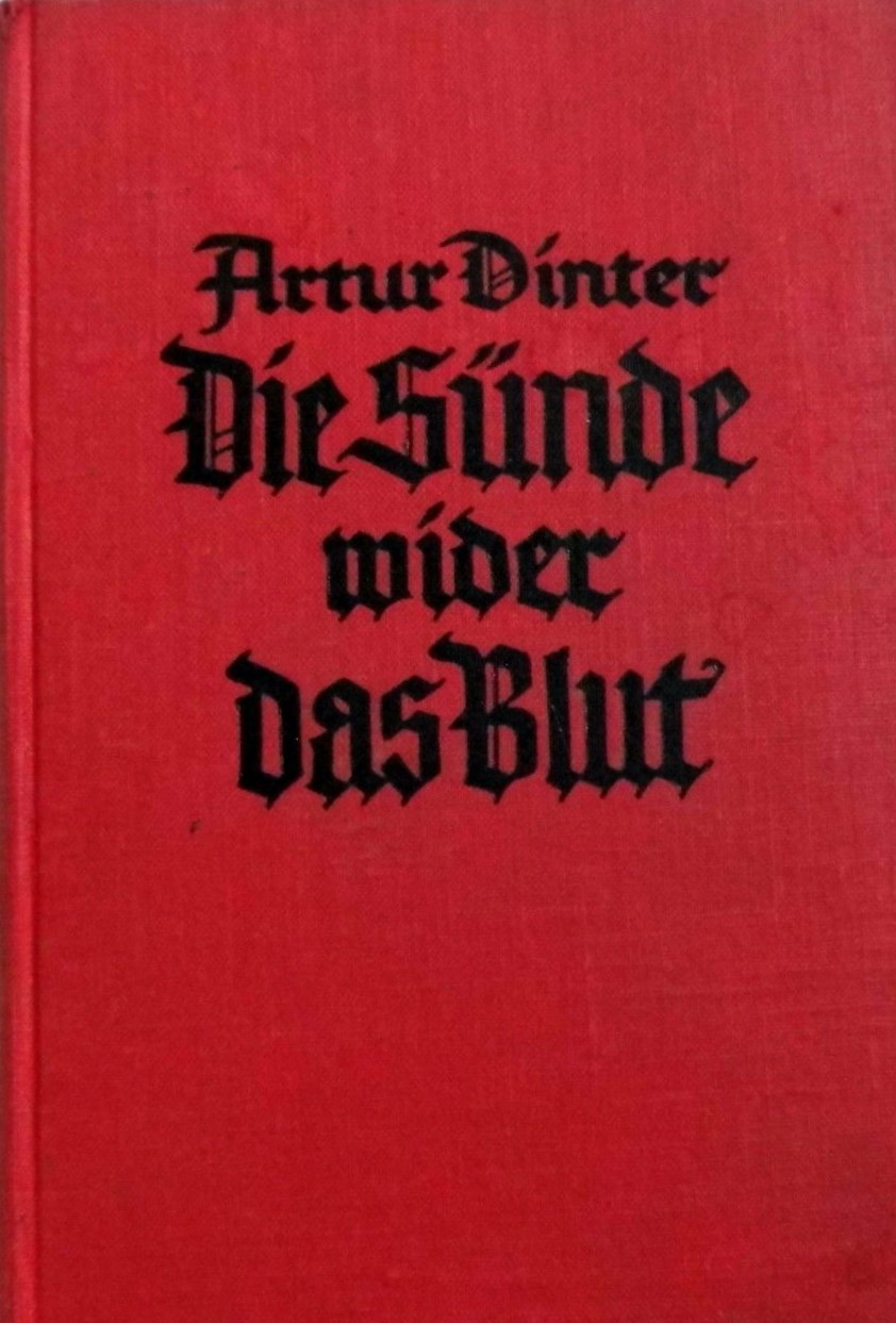 Artur Dinter, Die Sünde wider das Blut. Ein Zeitroman, 251.-260. Tausend, Hammer-Verlag, Leipzig, 1934